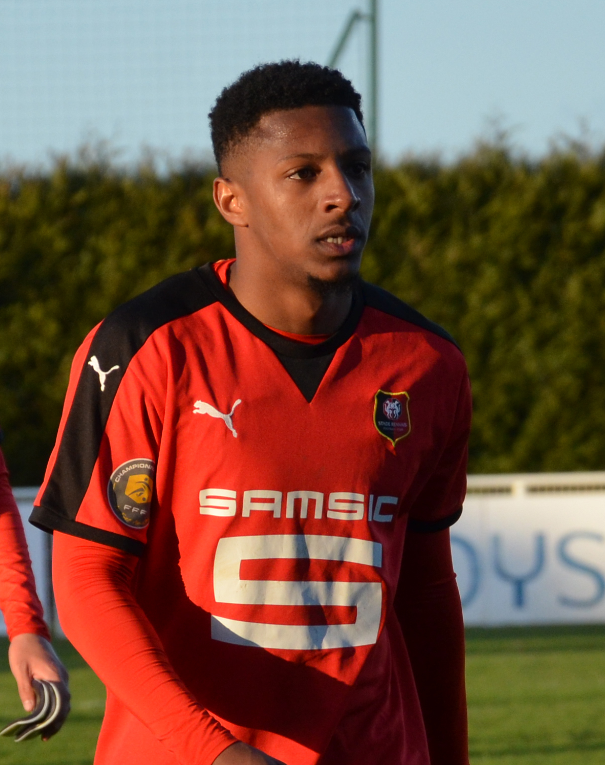 Photographie de Steven Moreira lors d'un match de CFA2 opposant le FC Saint-Lô au Stade rennais le 9 avril 2016.